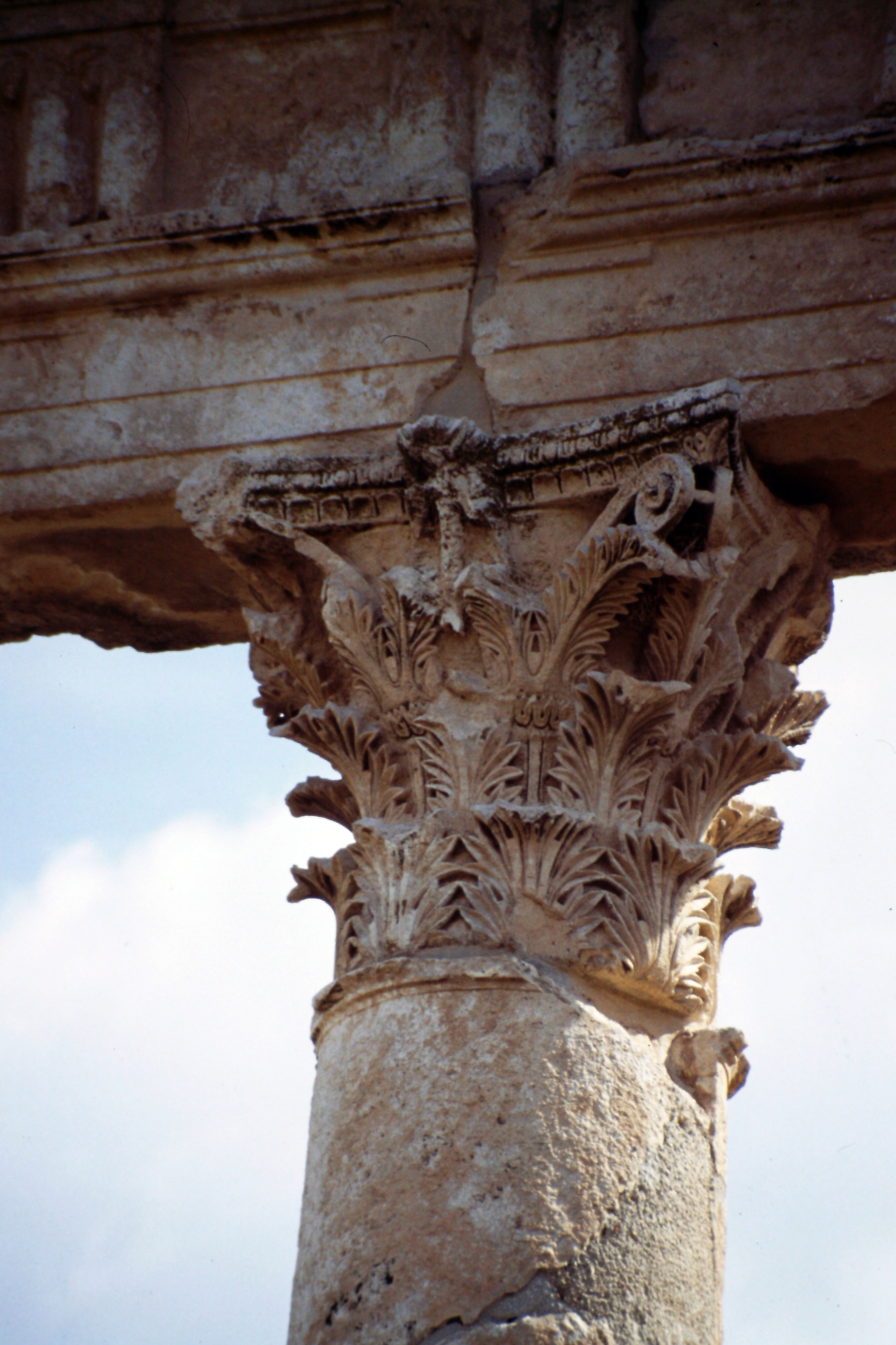 Apamea, 1993